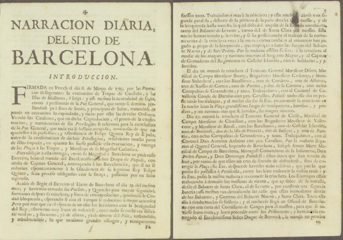 Relación diaria del sitio de Barcelona, capital del Principado de Cataluña